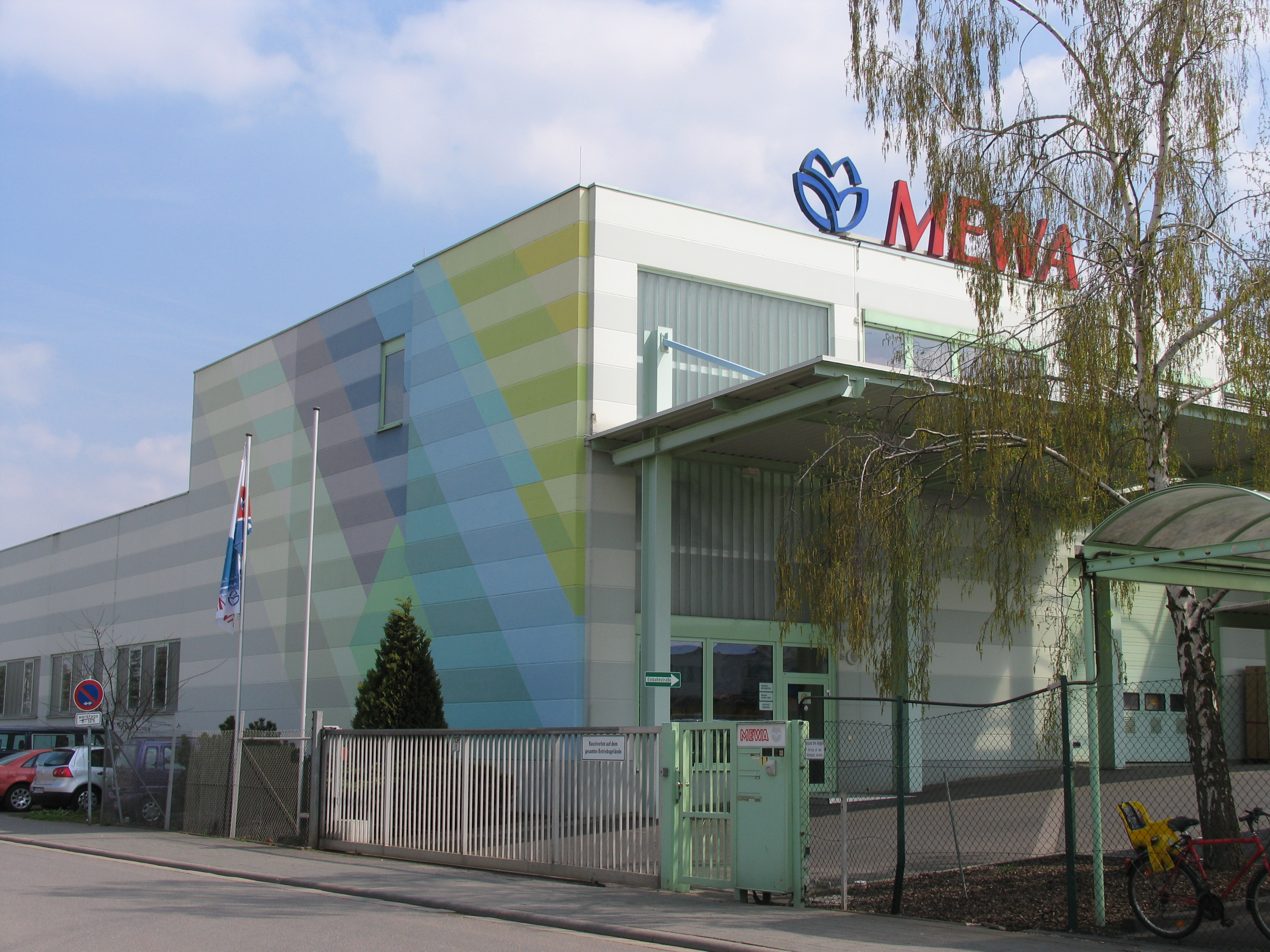 MEWA Textil-Mietservice AG & Co., Betrieb in Rodgau (Hessen)